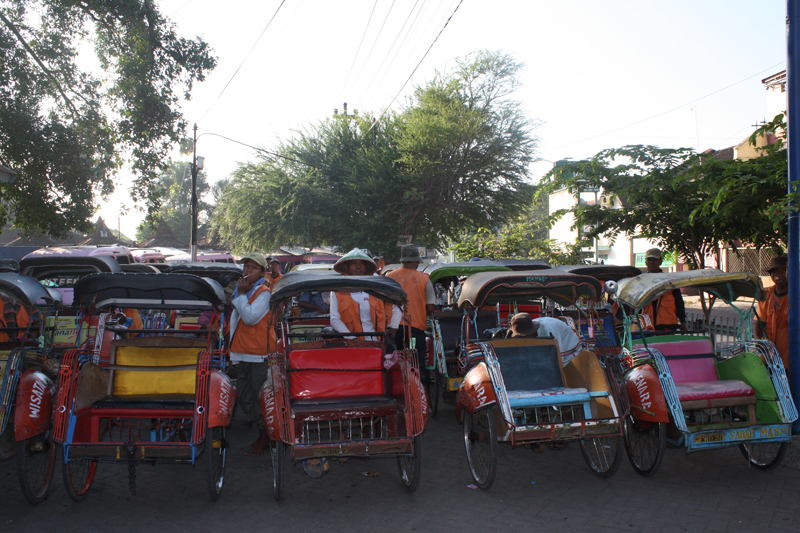 Terminal becak